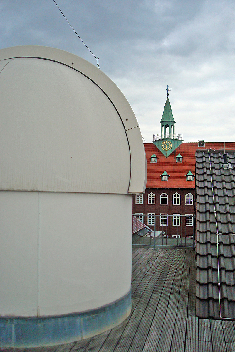 Blick von der Sternwarte des Evangelisch Stiftischen Gymnasiums auf das historische Hauptgebäude This image shows a heritage building in Germany, located in the North Rhine-Westphalian city Gütersloh (no. A 042).